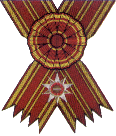 Орден Звезды Махапутера первого класса